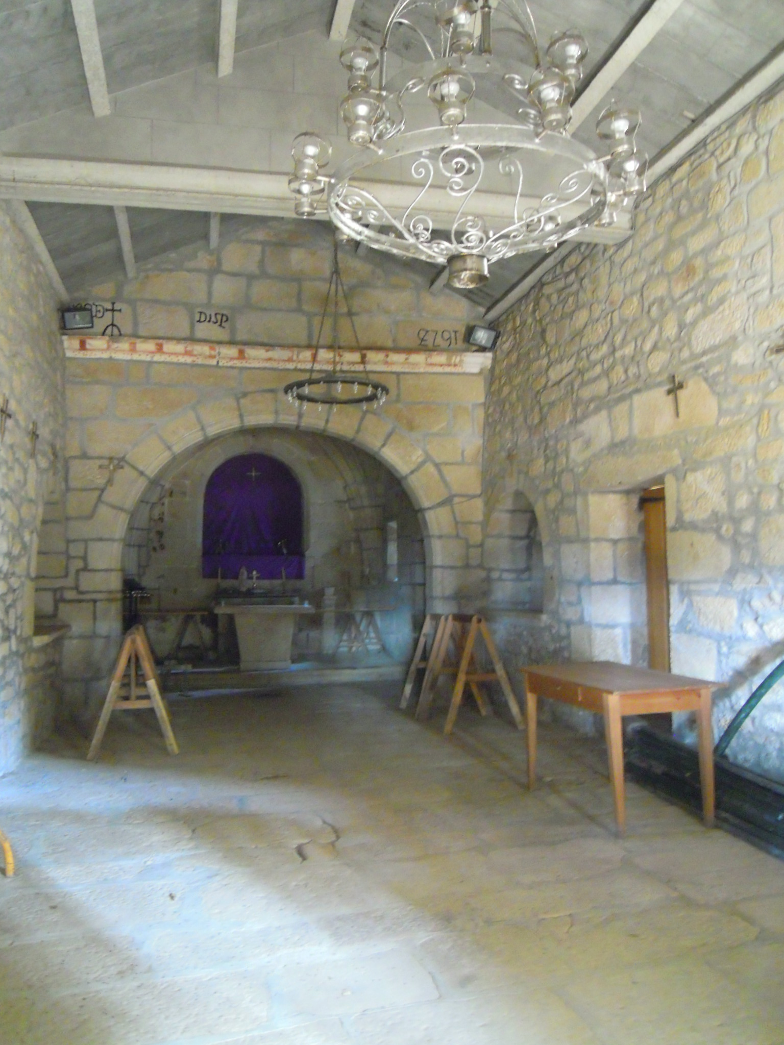 Interior da capela dos santos Xusto e Pastor, na carballeira de San Xusto, en San Xurxo de Sacos (Cerdedo-Cotobade).